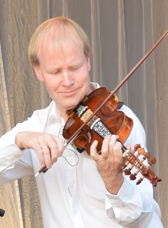 Arve Moen Bergset med Oslo-Filharmonien spiller Fanitullen. Myraløkka, Sagene, Oslo, 15. juni 2014